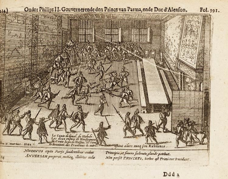 Moordpoging van Jean Jauregui op Willem van Oranje in 1582